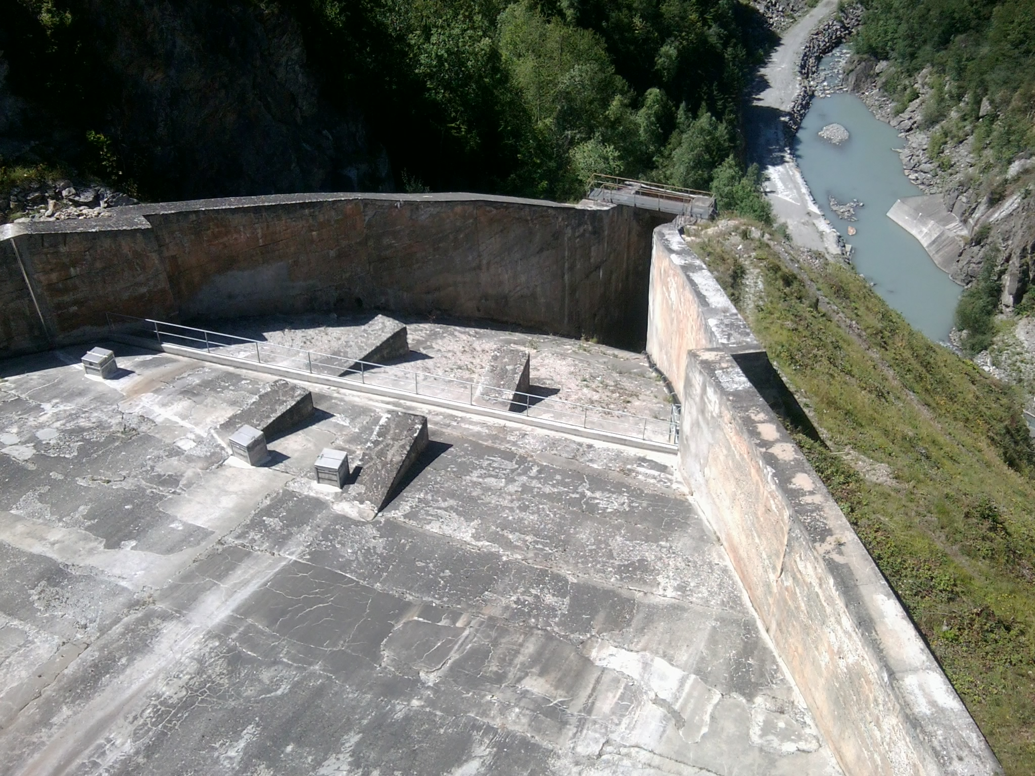 Barrage du Chambon (38) : L'évacuateur de crues.